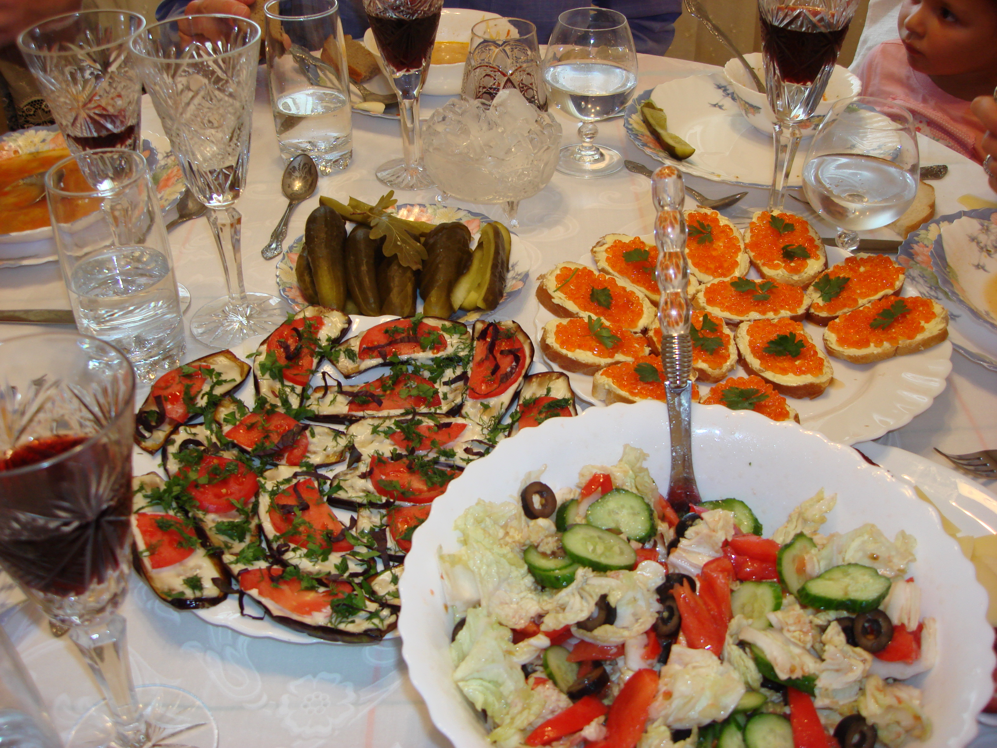 Russian Celebration Zakuski